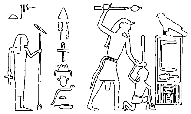 Felsreief des Djoser im Wadi Maghara